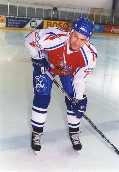 Владимир Антипин